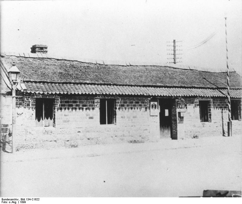 Schutzgebiet Kiautschou Tsingtau 1899: Alte Post